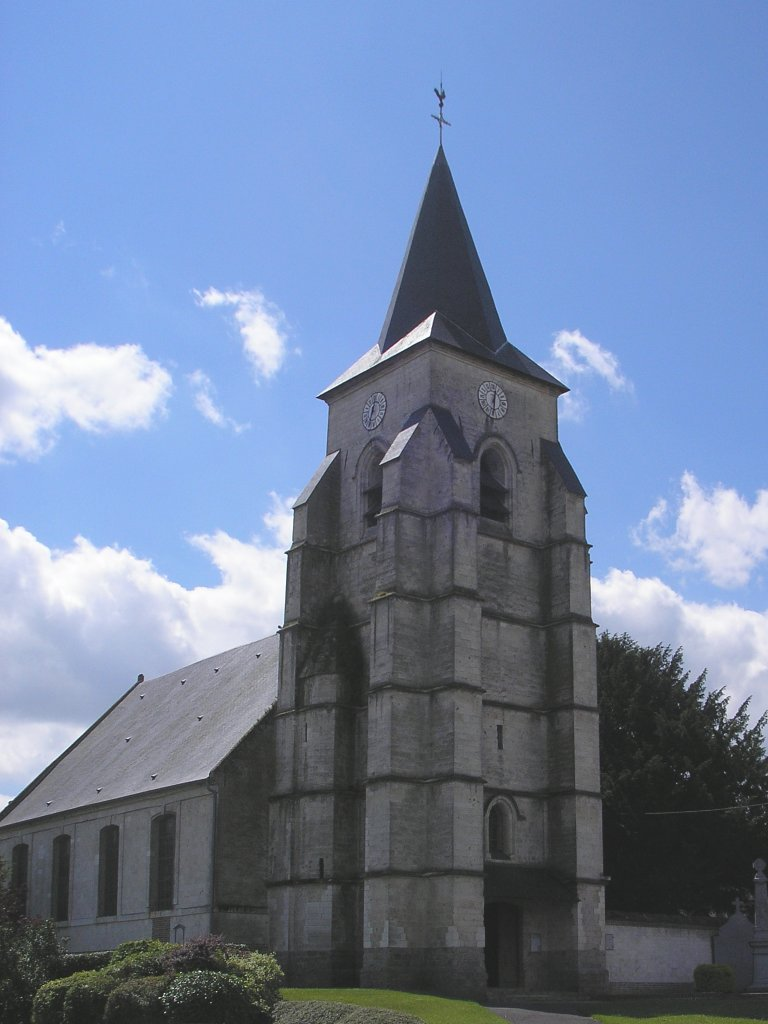 L'église de Duisans (Pas-de-Calais) prise par moi-même le 1er juillet 2007.